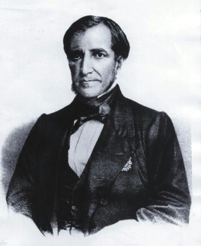 Barão de Mauá - Assembléia Geral Legislativa - Galeria dos Representantes da Nação (1861) - São Pedro do Sul. Litografia de Sisson.